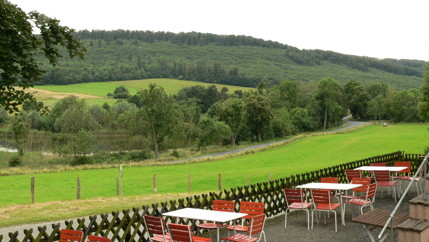 Reitlingstal